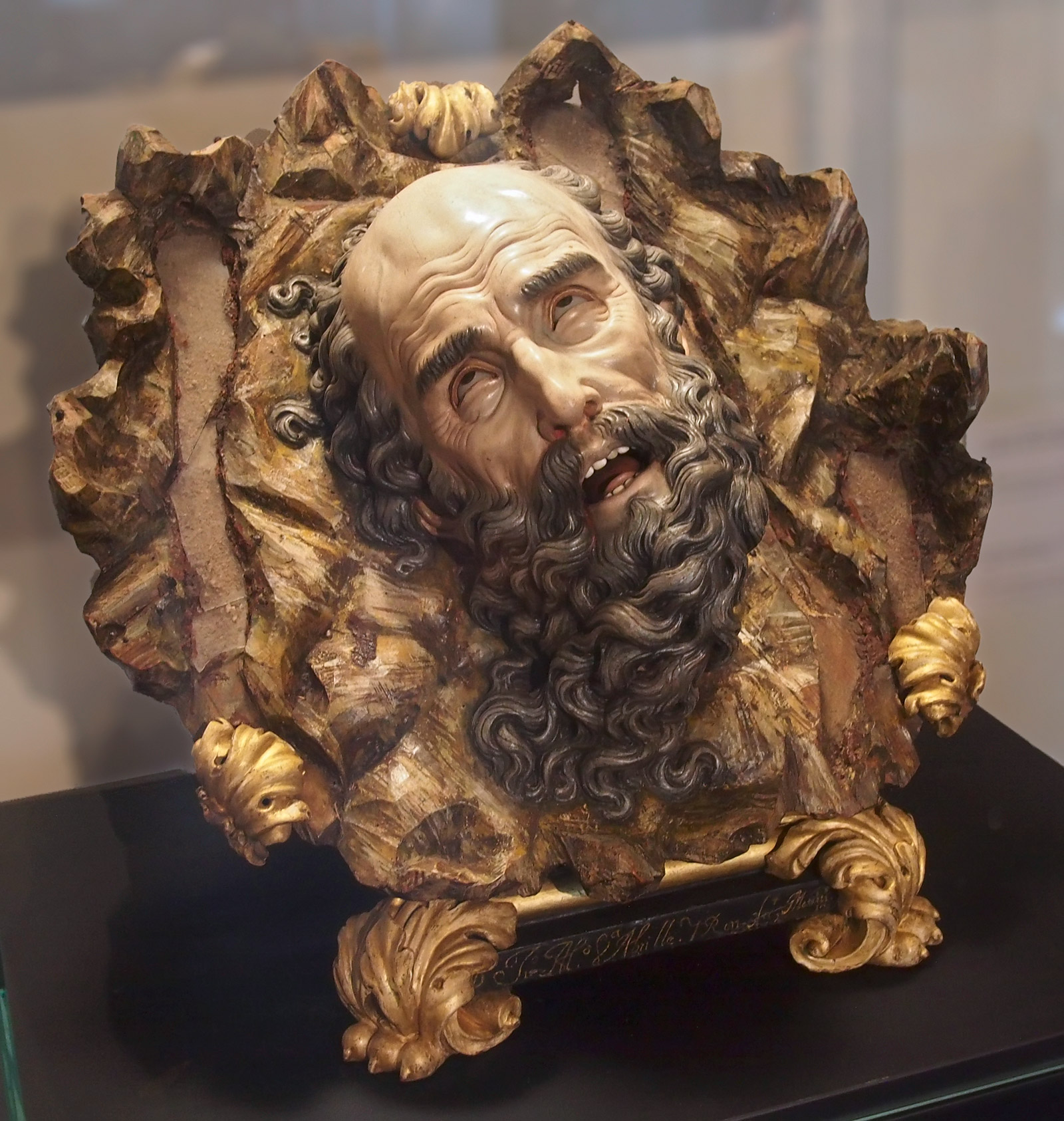 Cabeza de San Pablo, 1707, Juan Alonso Villabrille y Ron (c.1663-c.1728). Museo Nacional de Escultura, Valladolid.